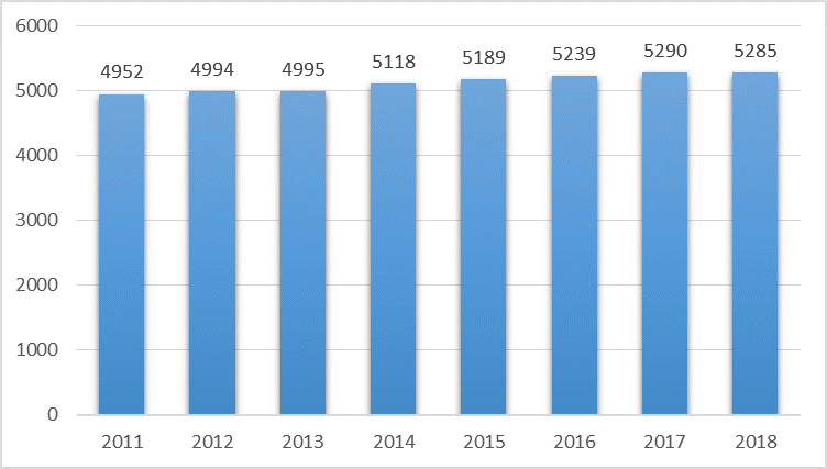 Evolution de la population de la Commune Bourg-en-Lavaux. Sources : OFS 31-12-2018